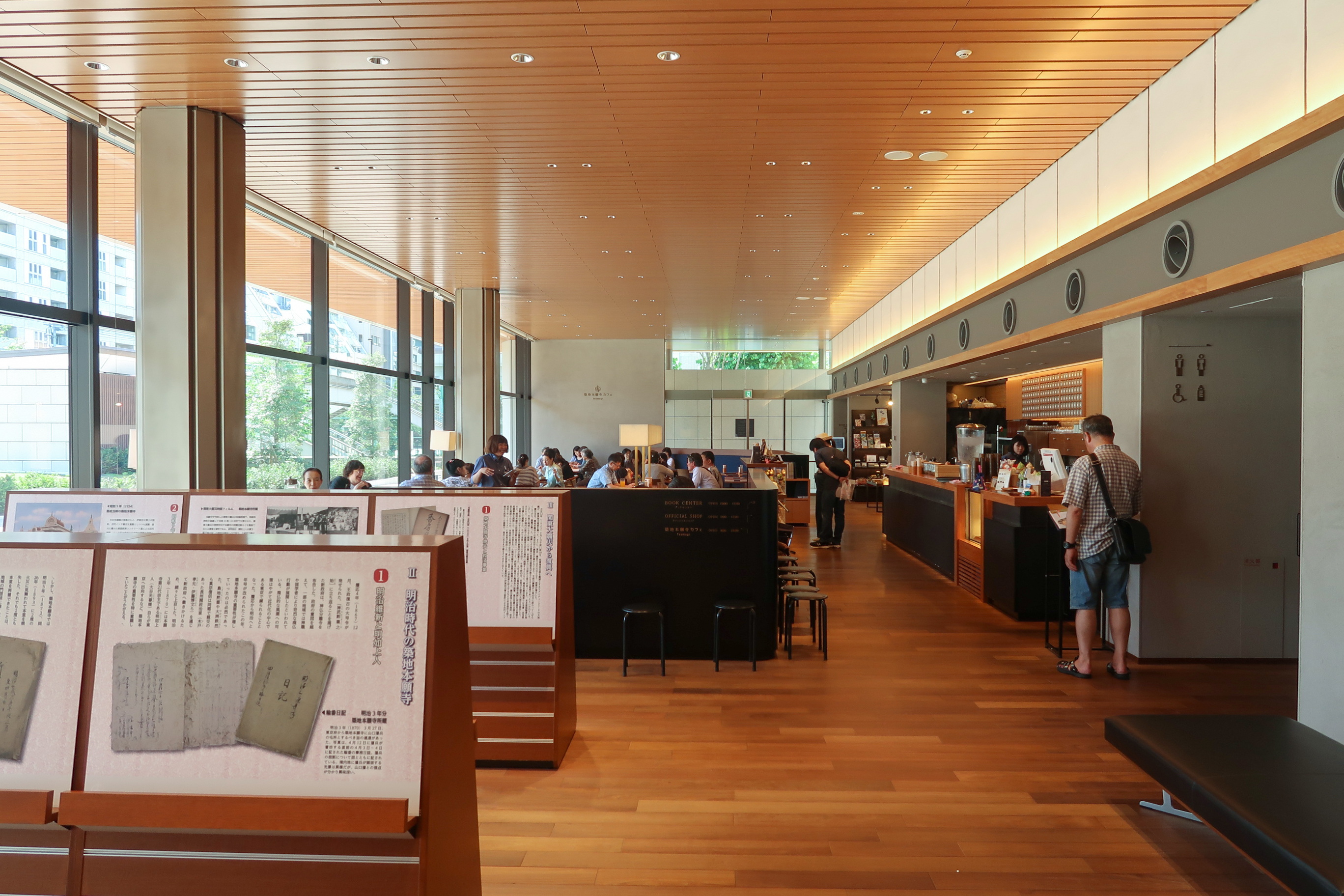 Tsukiji Hongan-ji Information Centre